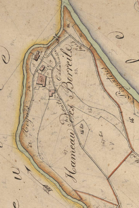 El veïnat dels Borrells, o de Can Borrell, en el Cadastre napoleònic del 1812 (Arxius Departamentals dels Pirineus Orientals)